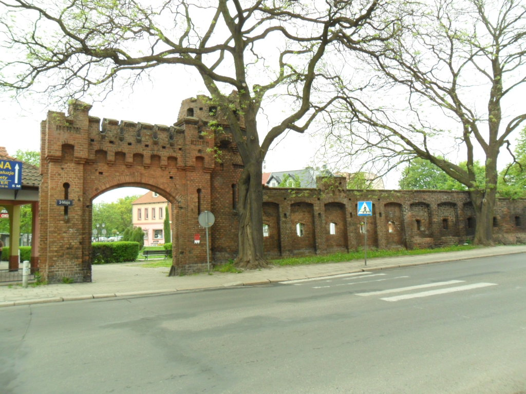 Fragment muru obronnego przy ul. 3 Maja